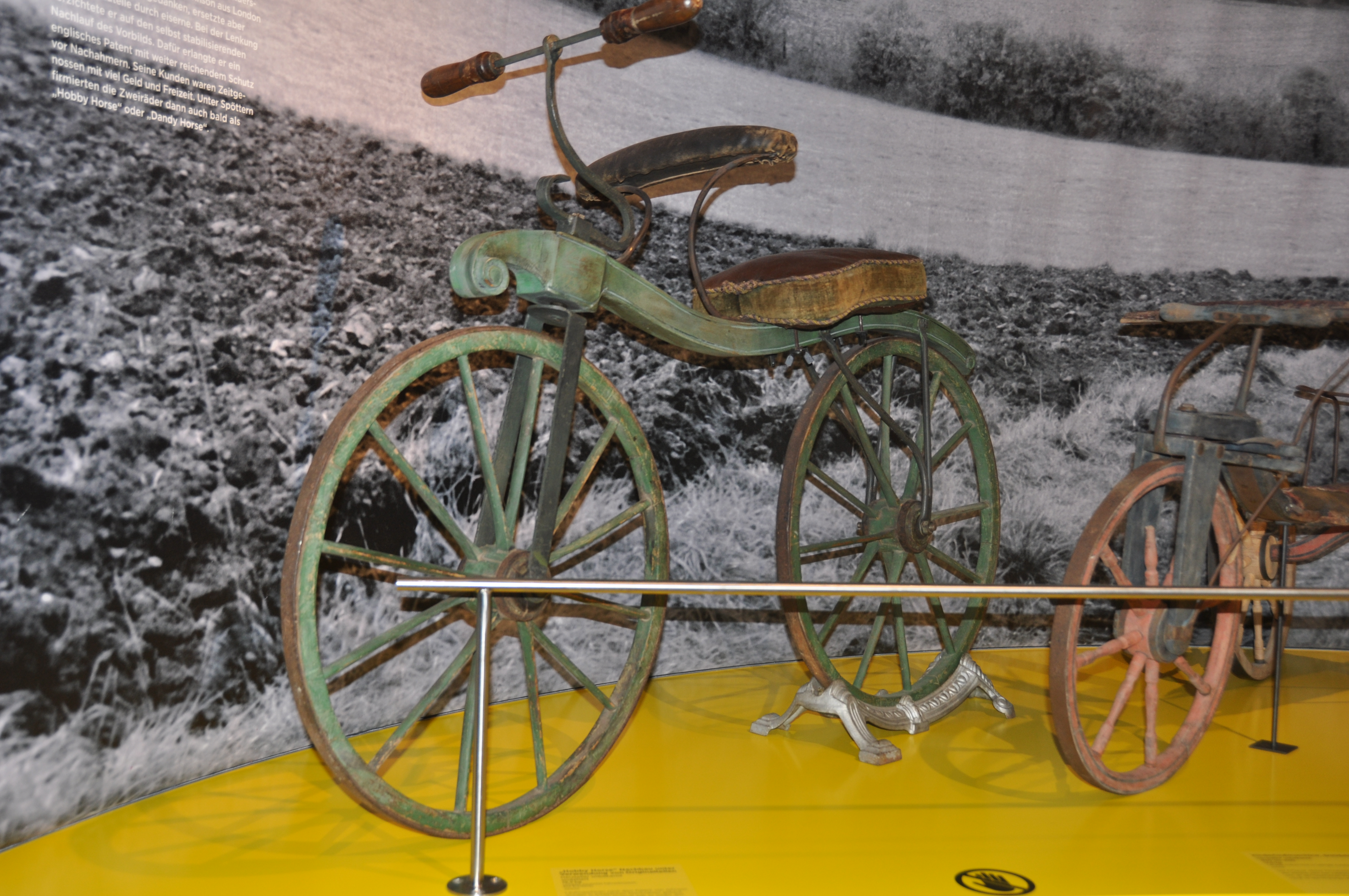 "Hobby horse" - Nachbau unter Verwendung von Originalteilen. Hersteller unbekannt, undatiert. 19.5 kg - Leihgabe des Deutschen Fahrradmuseums, Bad Brückenau